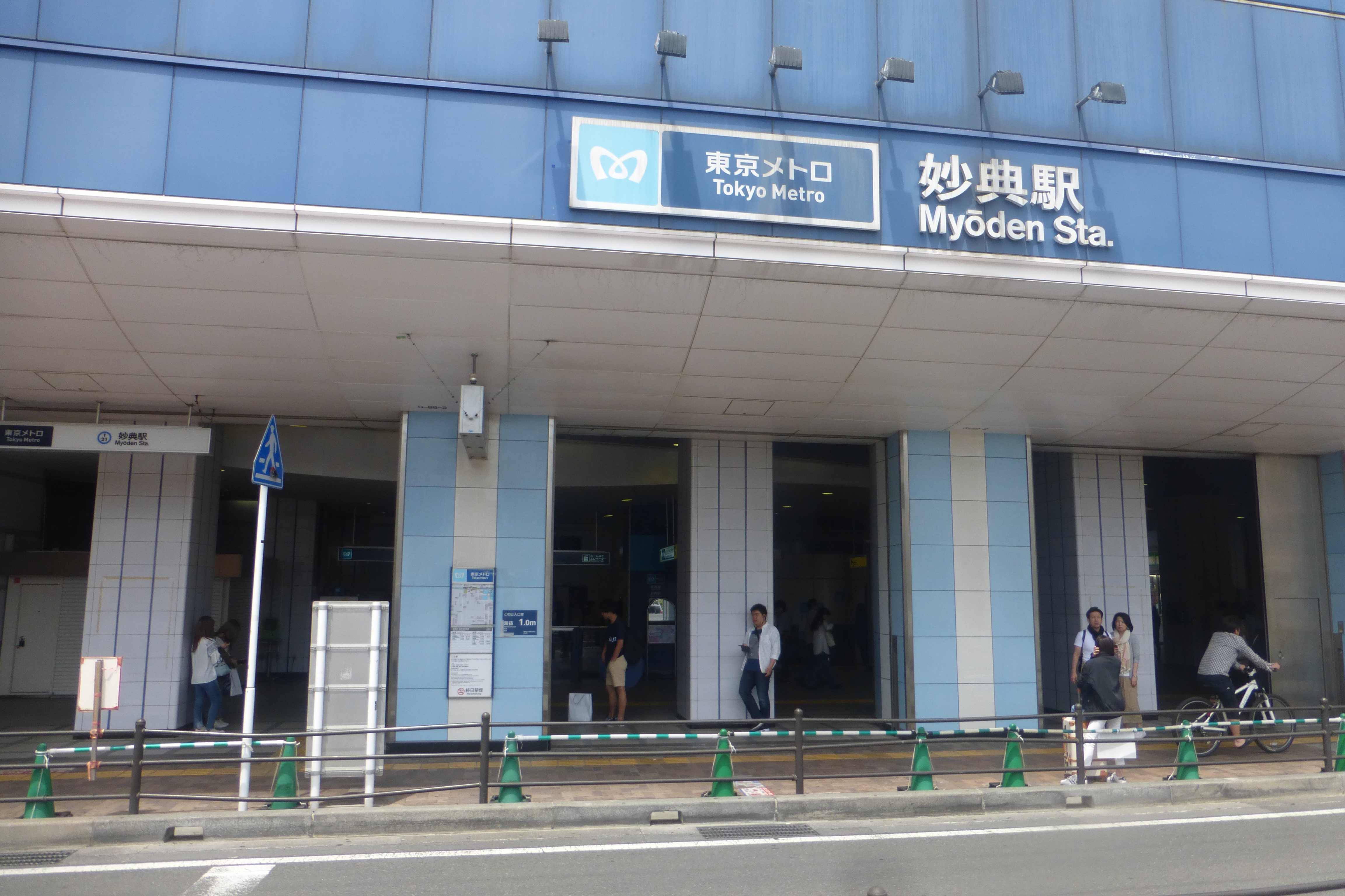 妙典駅 (Myōden Station)